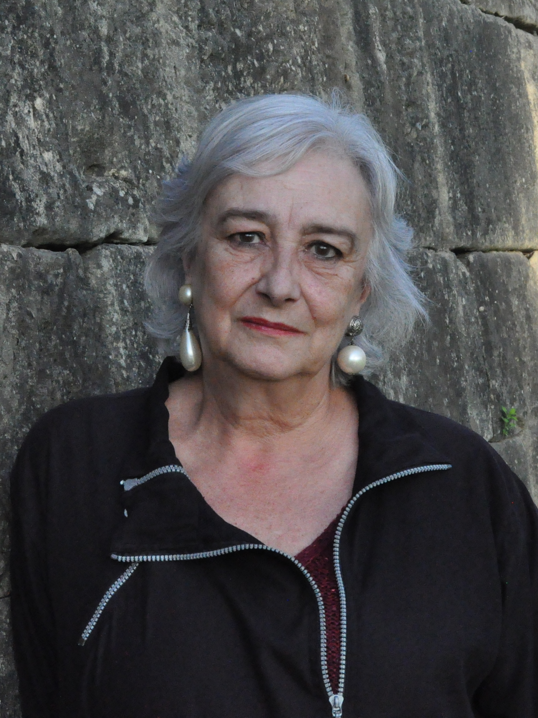 Arantxa Urretabizkaia idazlea. Argazkia: Pamiela argitaletxea